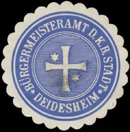 Sealing stamp Title: Bürgermeisteramt der K. bayer. Stadt Deidesheim Description: blau, weiß, geprägt Place: Deidesheim size: 4 cm